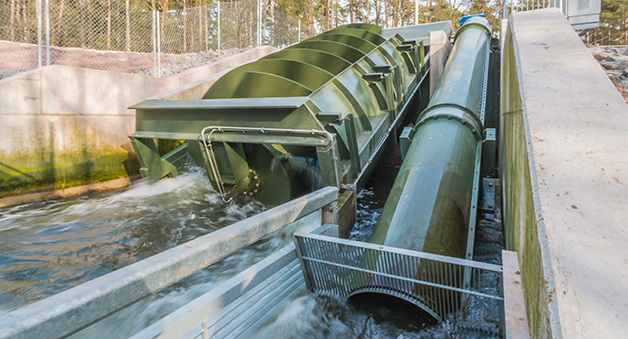 Wasserkraftanlagen mit Fischaufstiegsschnecke FAS (Fischlift) (System REHART/Strasser) am Heckerwehr/Bayern